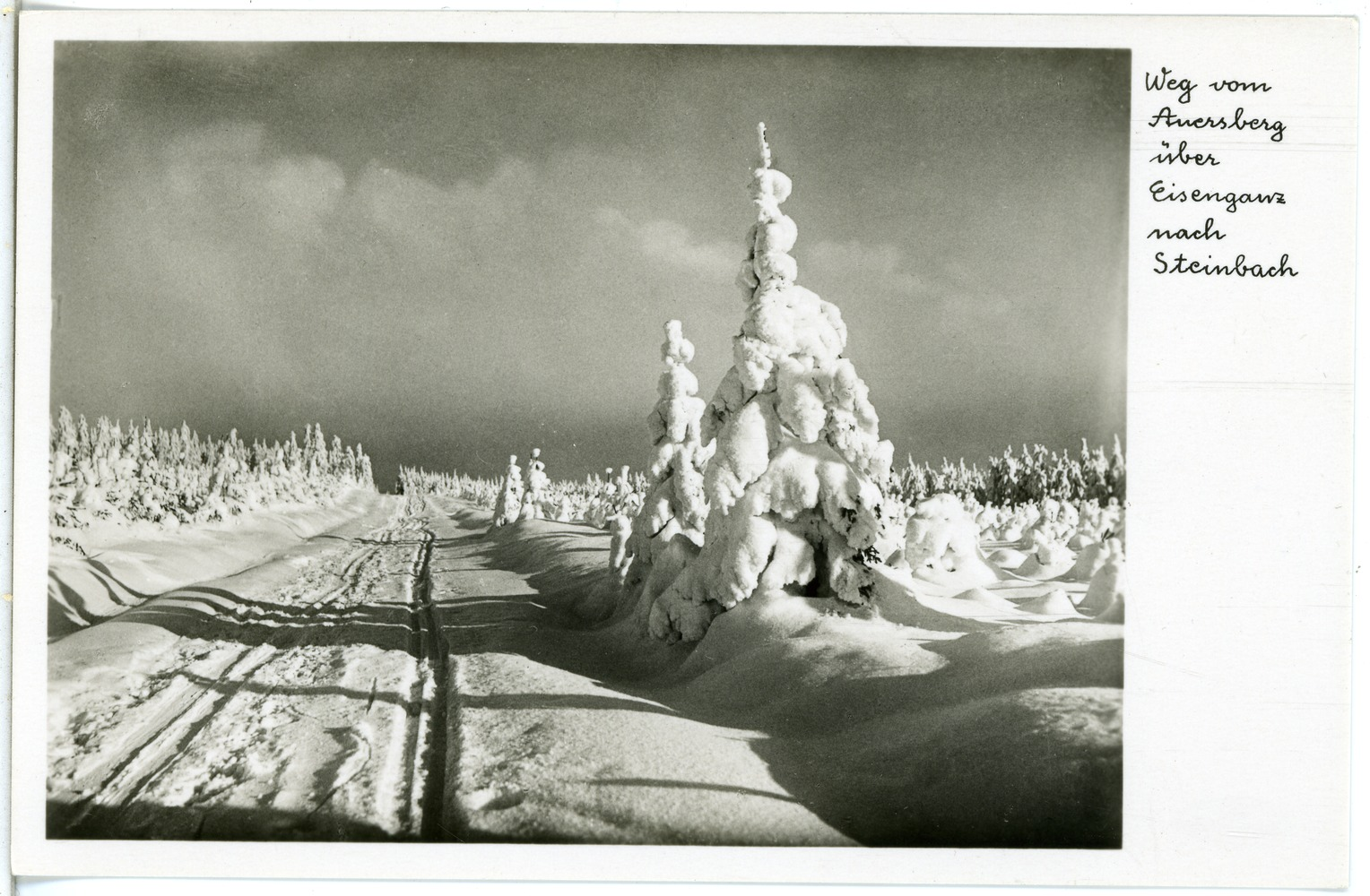 Auersberg; Weg vom Auersberg über Eisenganz nach Steinbach This postcard is from publisher Brück & Sohn in Meißen ( postcard has a unique number 26363 and is available in a higher resolution at the publisher. This images was uploaded in a cooperation project between Wikipedians and the publisher.